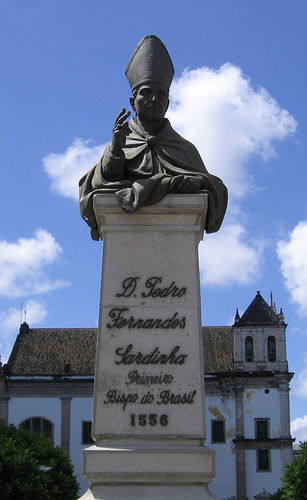 Pero Fernandes Sardinha ; Bispo Sardinha